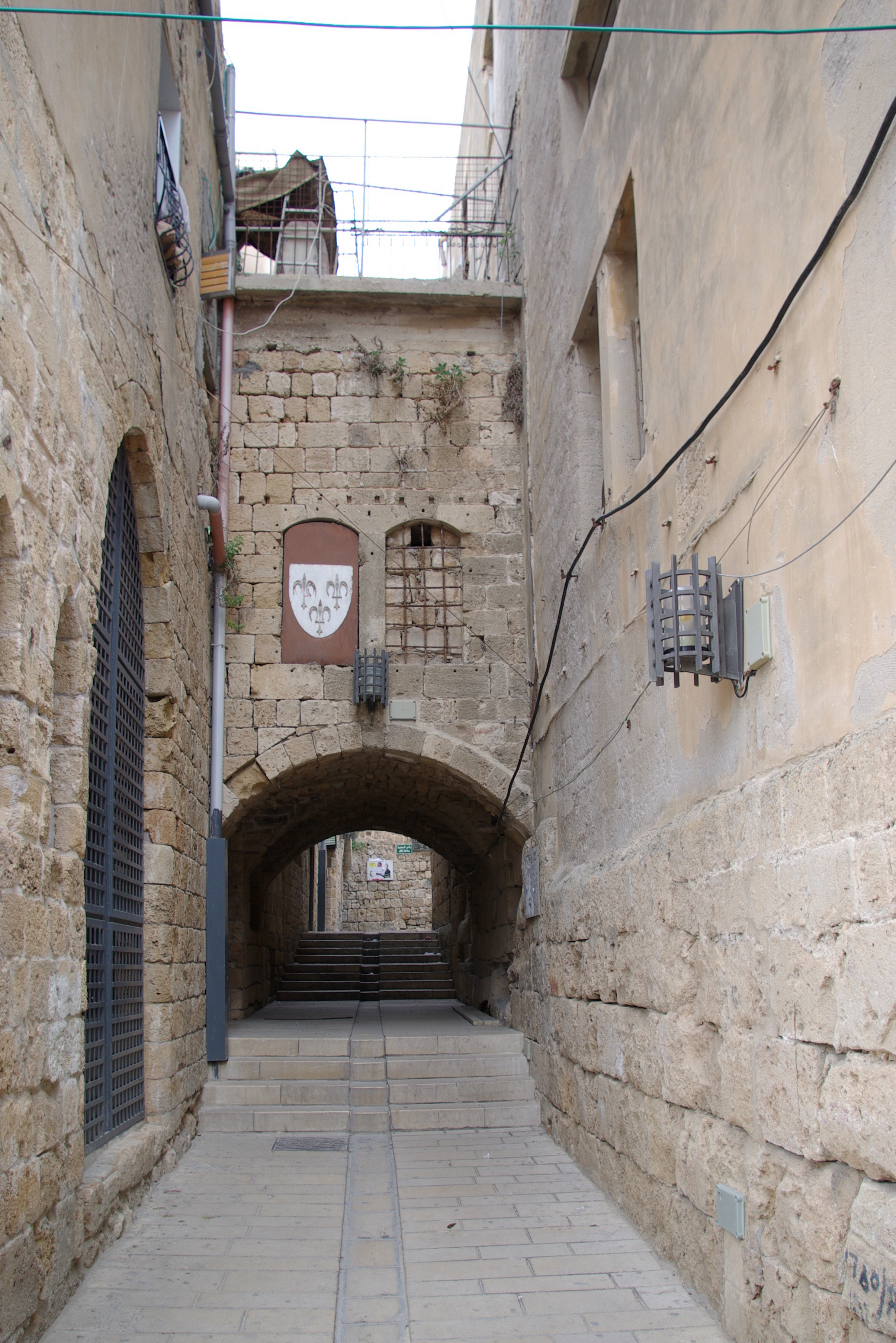 Acre